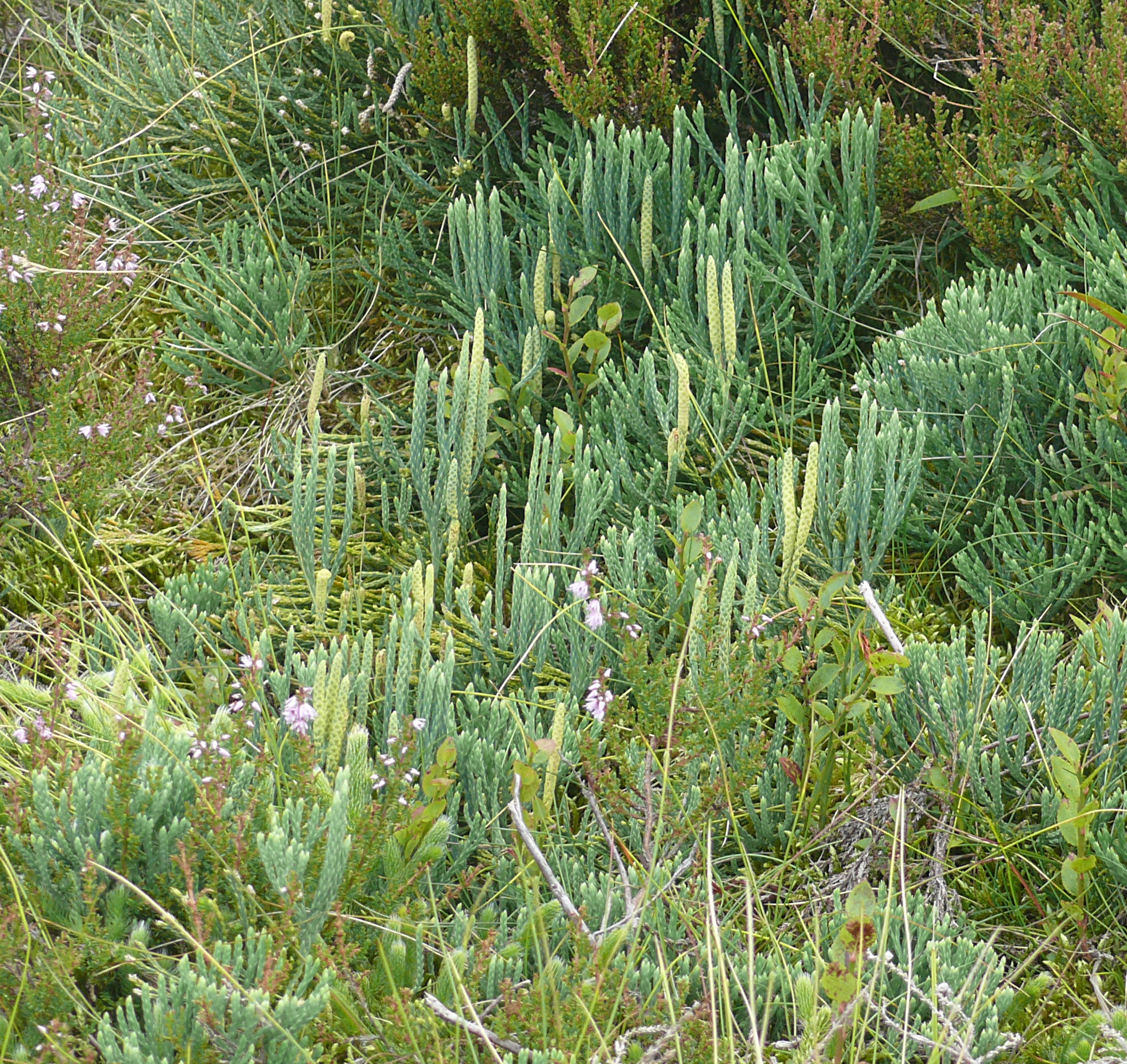 Diphasiastrum oellgaardii, Schwarzwald